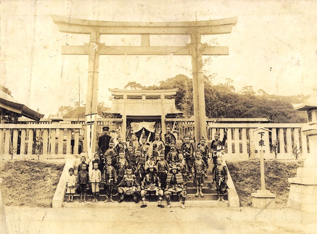 中文（台灣）: 1941昭和16年/03/25 鎮座